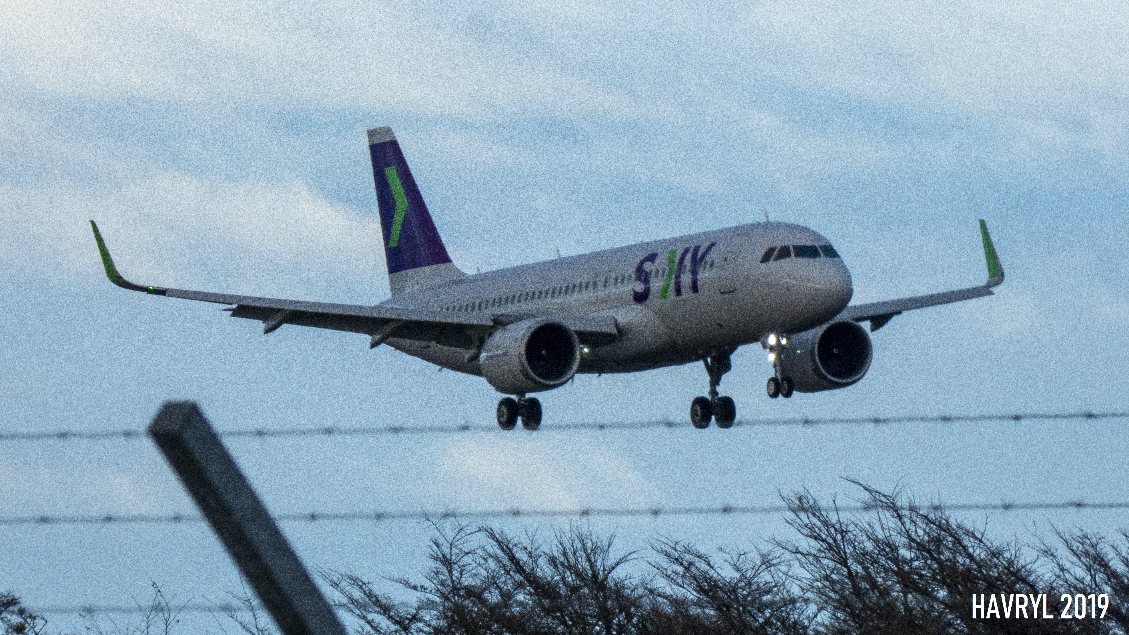 Airbus A320neo de SKY aterrizando en Punta Arenas